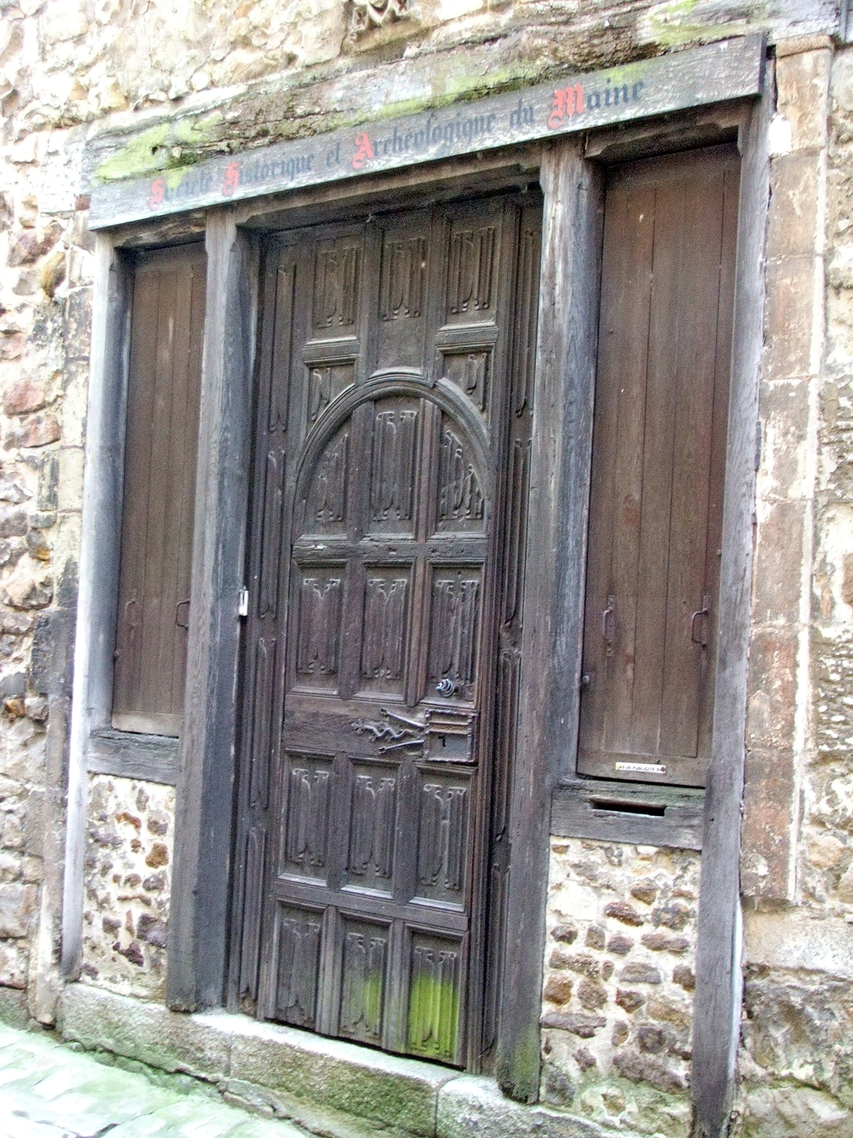 Siège pittoresque de la société archéologique du Mans dans le Vieux-Mans.